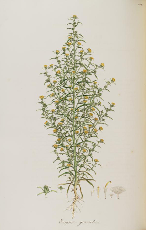 Legende: a Hülle (x1). A Hülle (vergr.). b Strahlenblüte (x1). B. Strahlenblüte (vergr.). c Röhrenblüte (x1). C Röhrenblüte (vergr.). d Frucht (x1). D Frucht (vergr.).